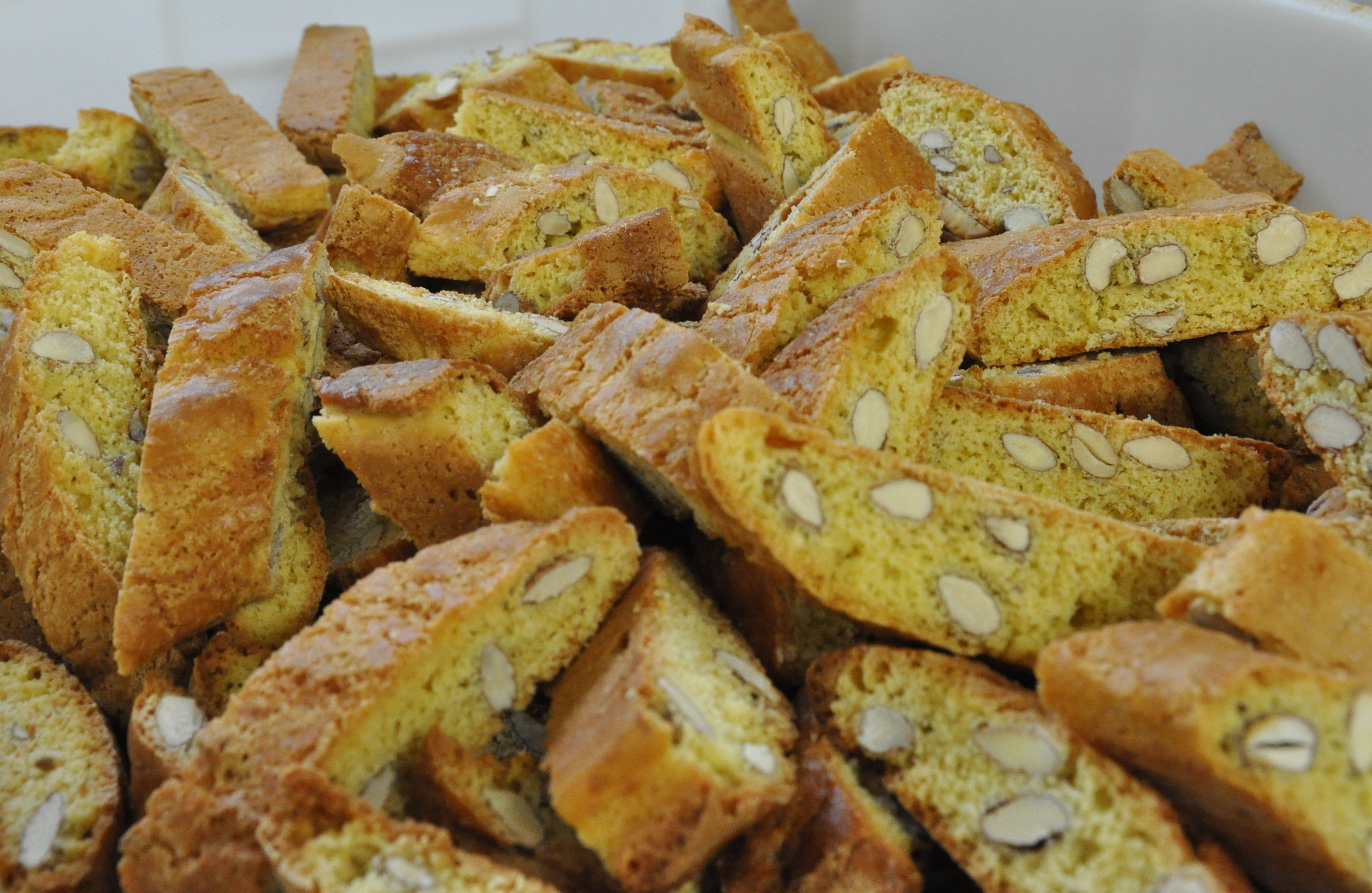 I cantuccini , Toscana - Italia